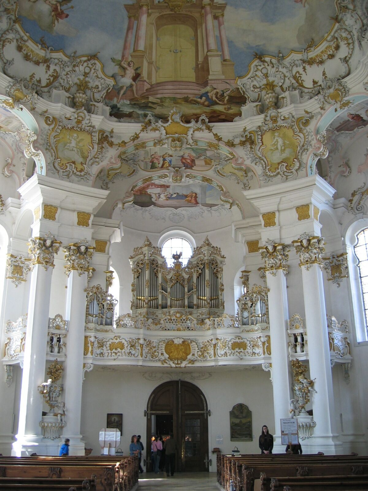 Eingang zur Wieskirche